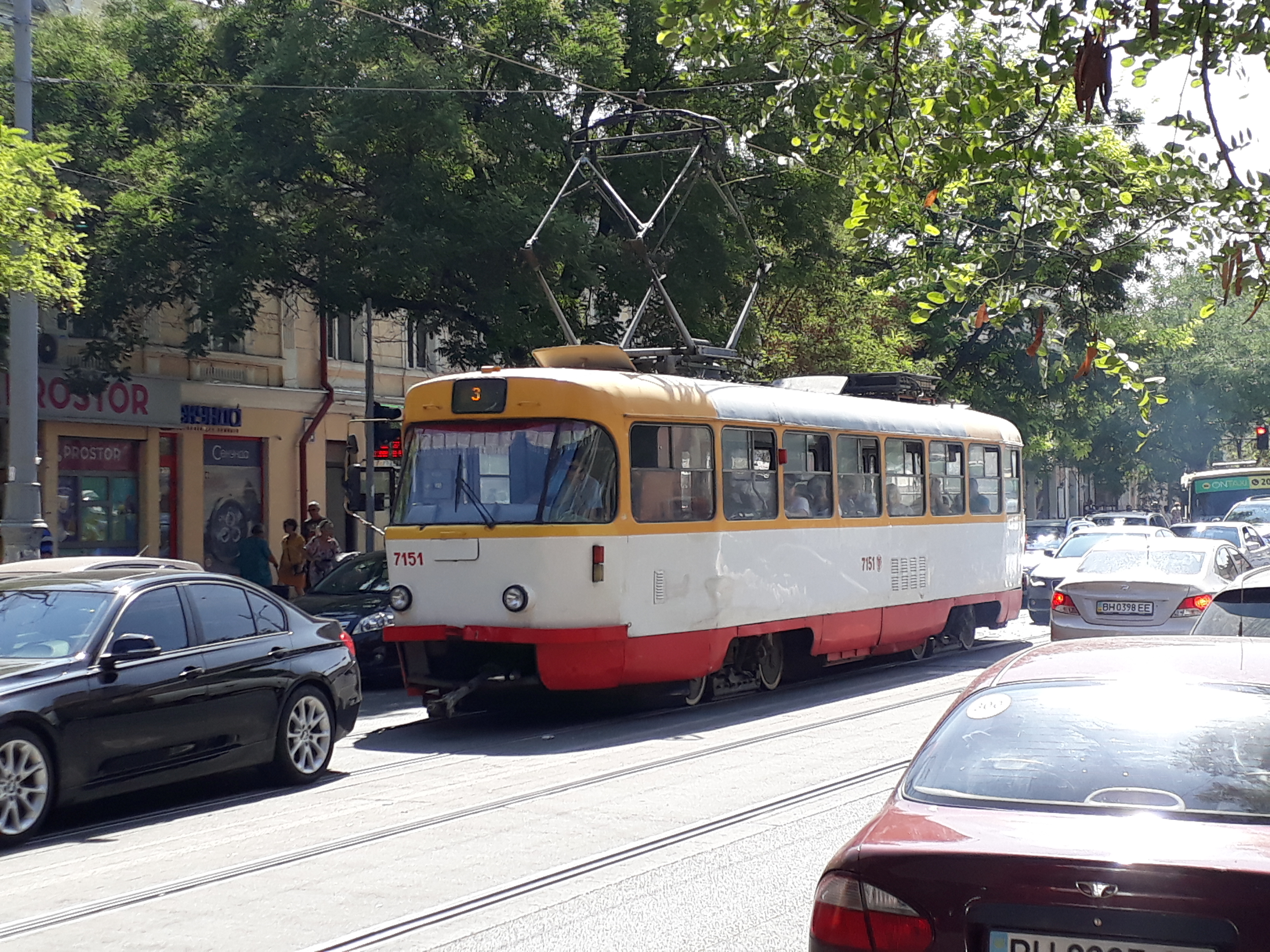 Ризький трамвай в Одесі.